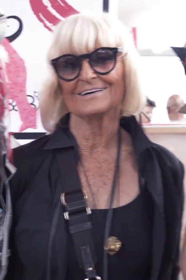 Barbara Hulanicki (ur. 1936), brytyjska projektantka mody pochodzenia polskiego.